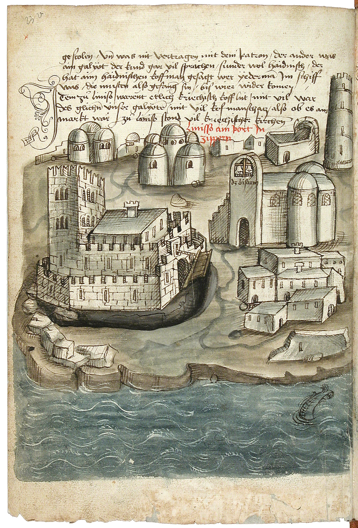 Schilderung einer Pilgerreise von Konstanz nach Jerusalem durch Konrad von Grünenberg, um 1487 Konrad von Grünenberg: Beschreibung der Reise von Konstanz nach Jerusalem - Cod. St. Peter, pap. 32. Handschrift, Bodenseegebiet (Konstanz?), um 1487. II + 53 Blätter, 32x21, mit 31 kolorierten Zeichnungen der Reiseroute von Venedig bis Palästina. Text in alemannischer Mundart.